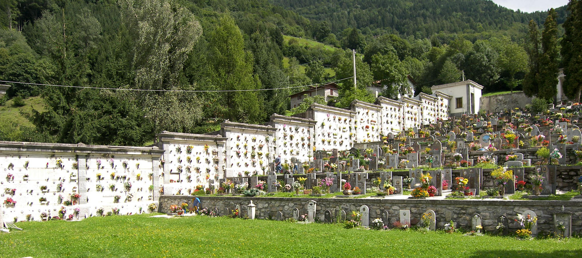 Friedhof von Bagolino